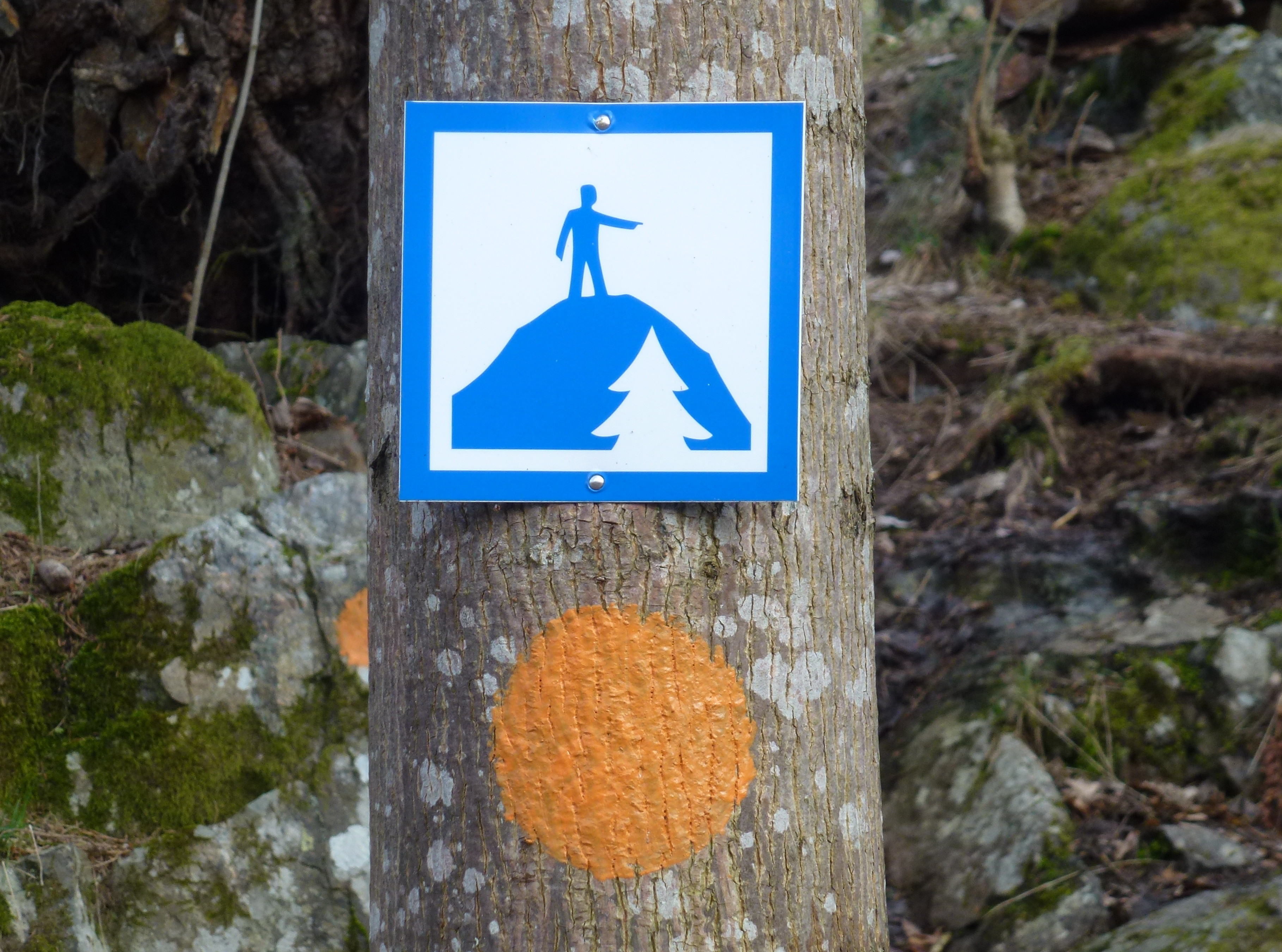 Mälarpromenaden skylt "utsiktsplats" och markering